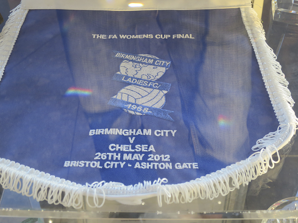 2012 FA Cup final pennant